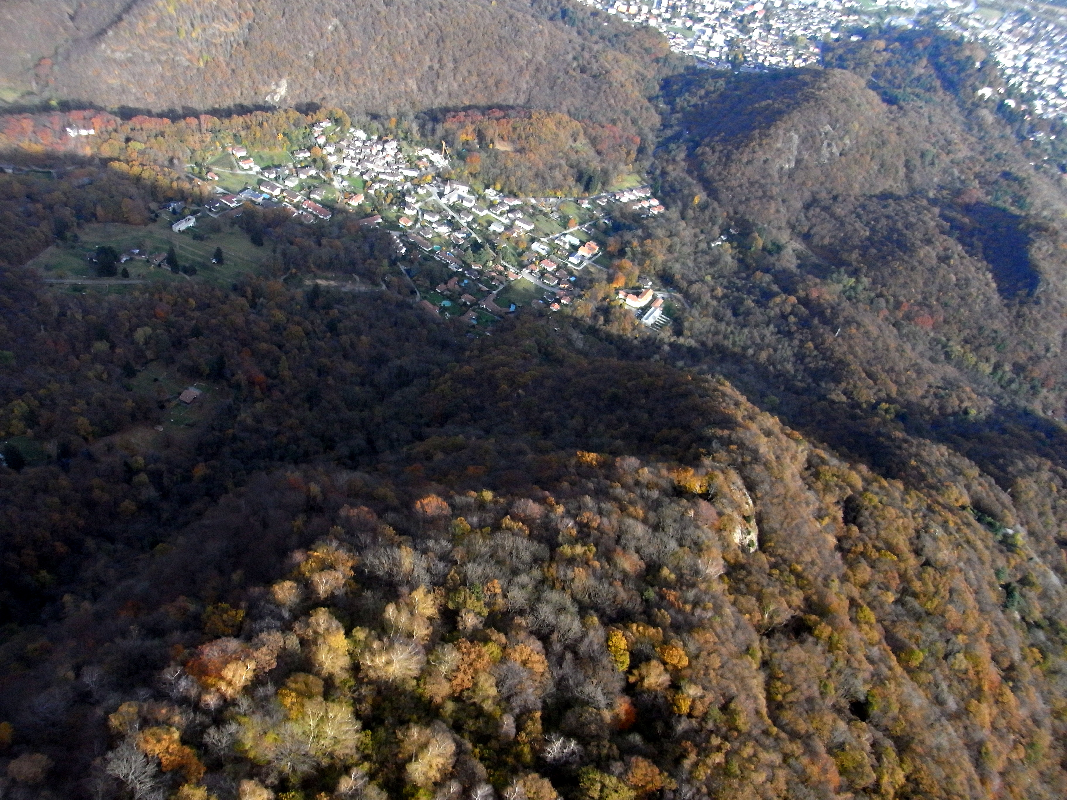 Arscegn